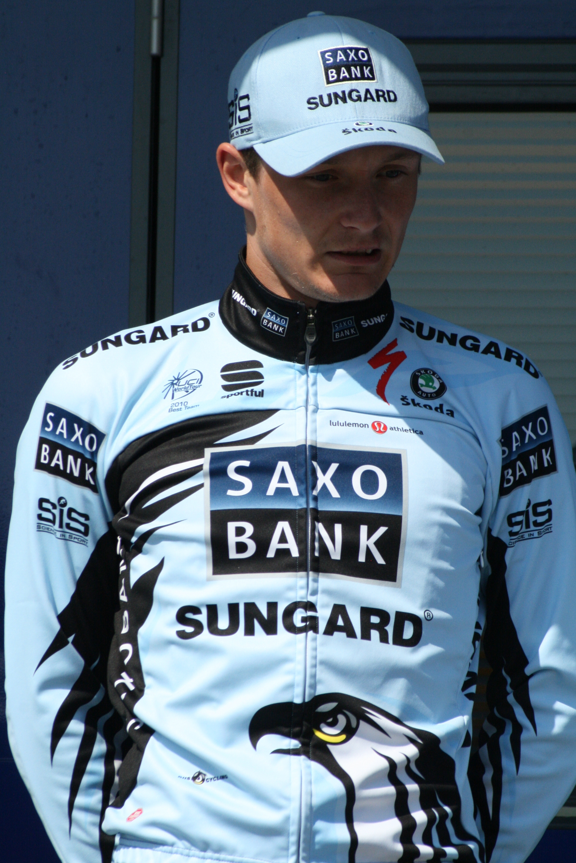 Présentation des coureurs au départ de la première étape Jarosław Marycz